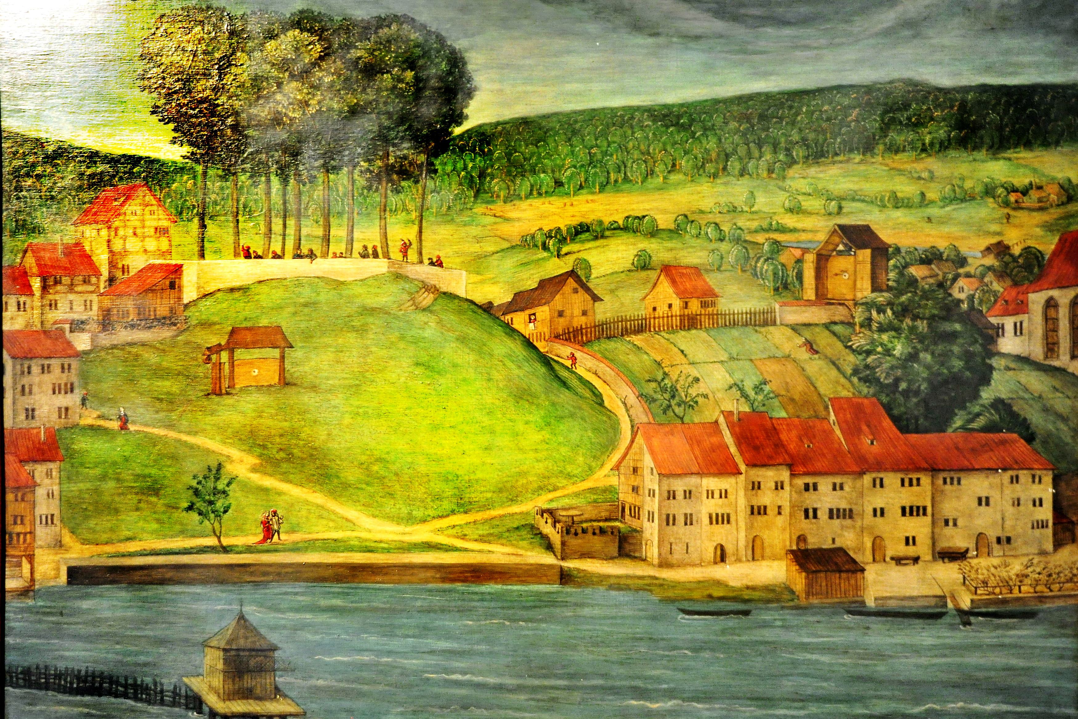 Replik der Altartafeln von Hans Leu im Baugeschichtlichen Archiv der Stadt Zürich im Haus zum Rech. Die Panoramansicht des linksseitigen Limmatufers – 'Standort' der BetrachterIn ist wohl der Karlsturm des Grossmünsters – von Hans Leu d. Ä. gilt als die älteste zuverlässige Darstellung der Stadt Zürich, Ende des 15. Jahrhunderts auf den Altartafeln im Grossmünster mit viel Liebe zum Detail festgehalten. Die originalen Tafeln sind heute im Landesmuseum ausgestellt, eine (vermutlich) 1:1 Replik ist im Stadtarchiv öffentlich zugänglich.